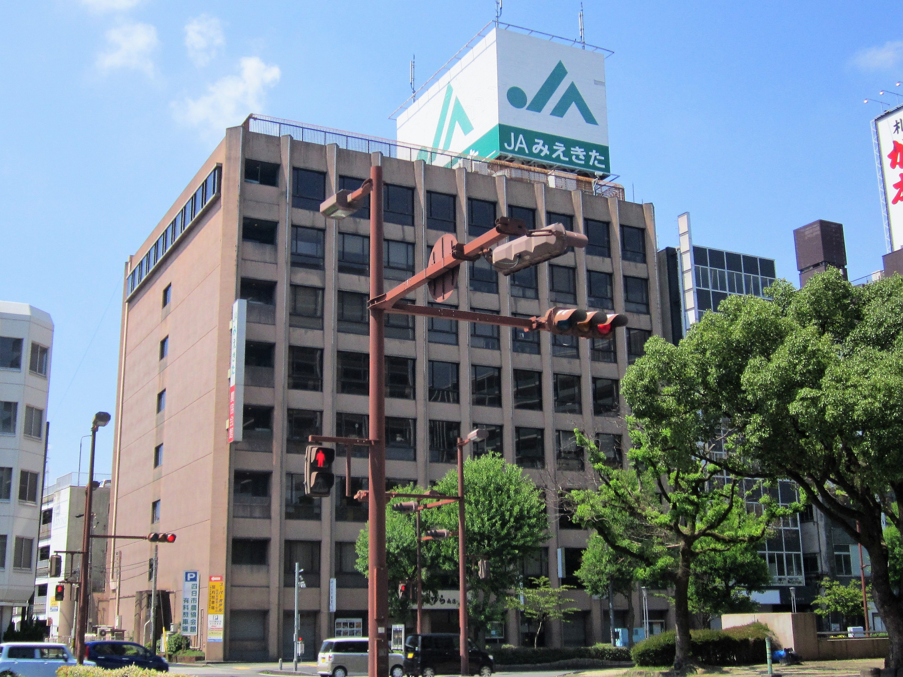 三重北農業協同組合 本店（四日市市浜田町）